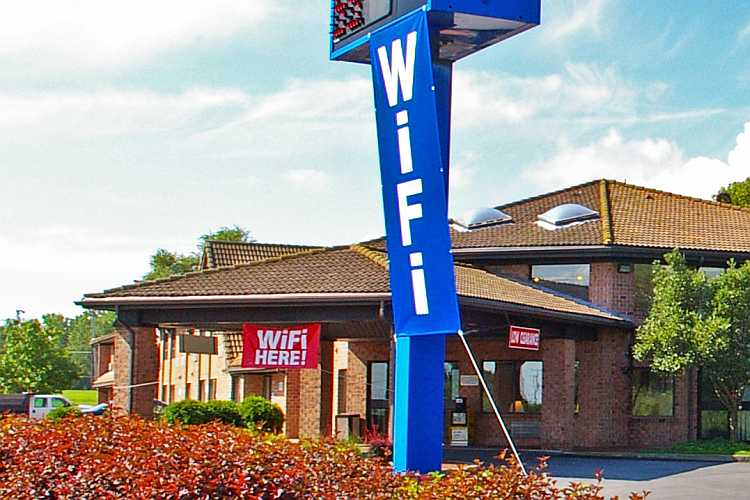 WIFI-Werbung an einem US-Motel